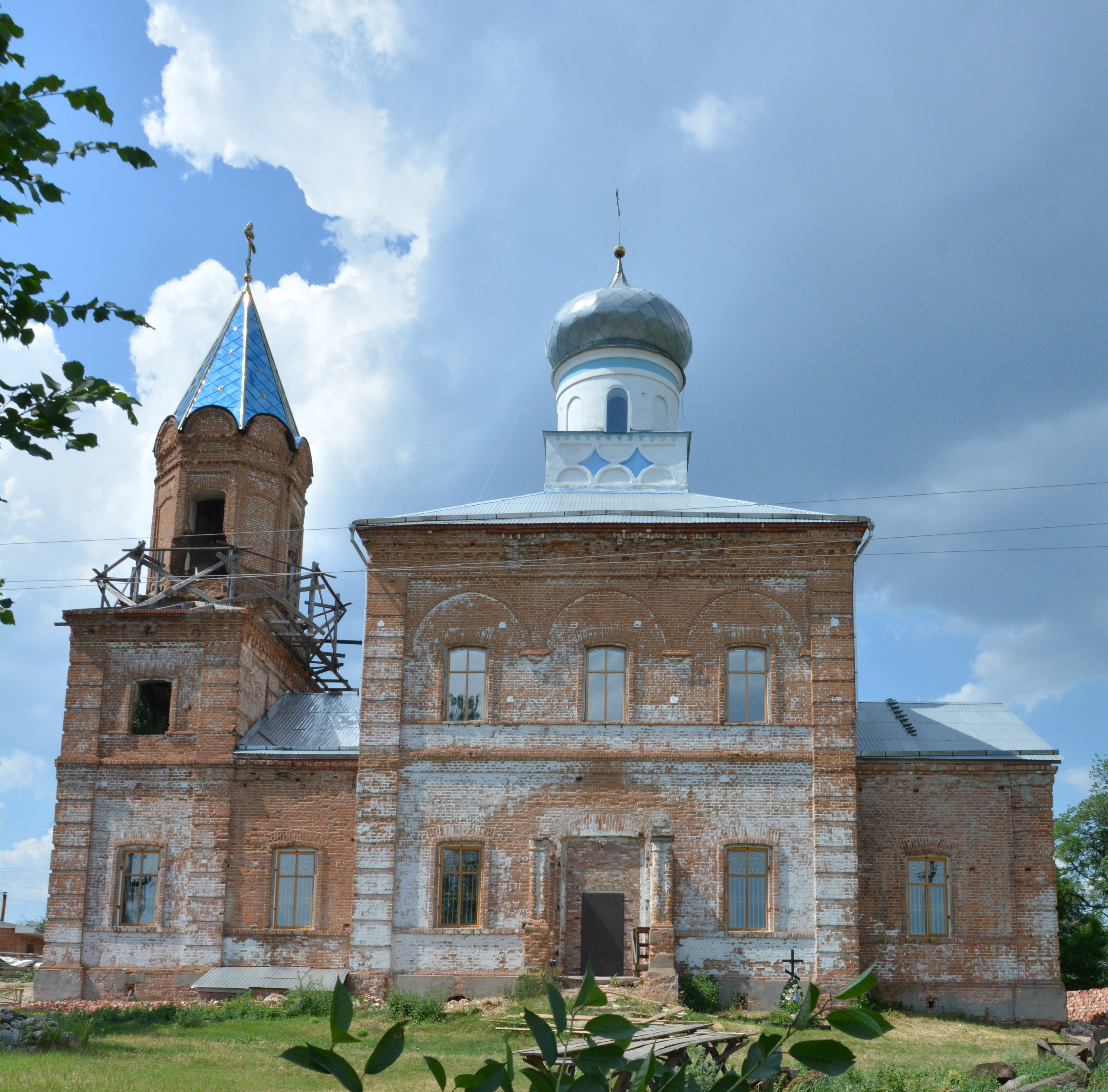 Покровська церква (мур.), Лебедин, вул. Покрівська, 44